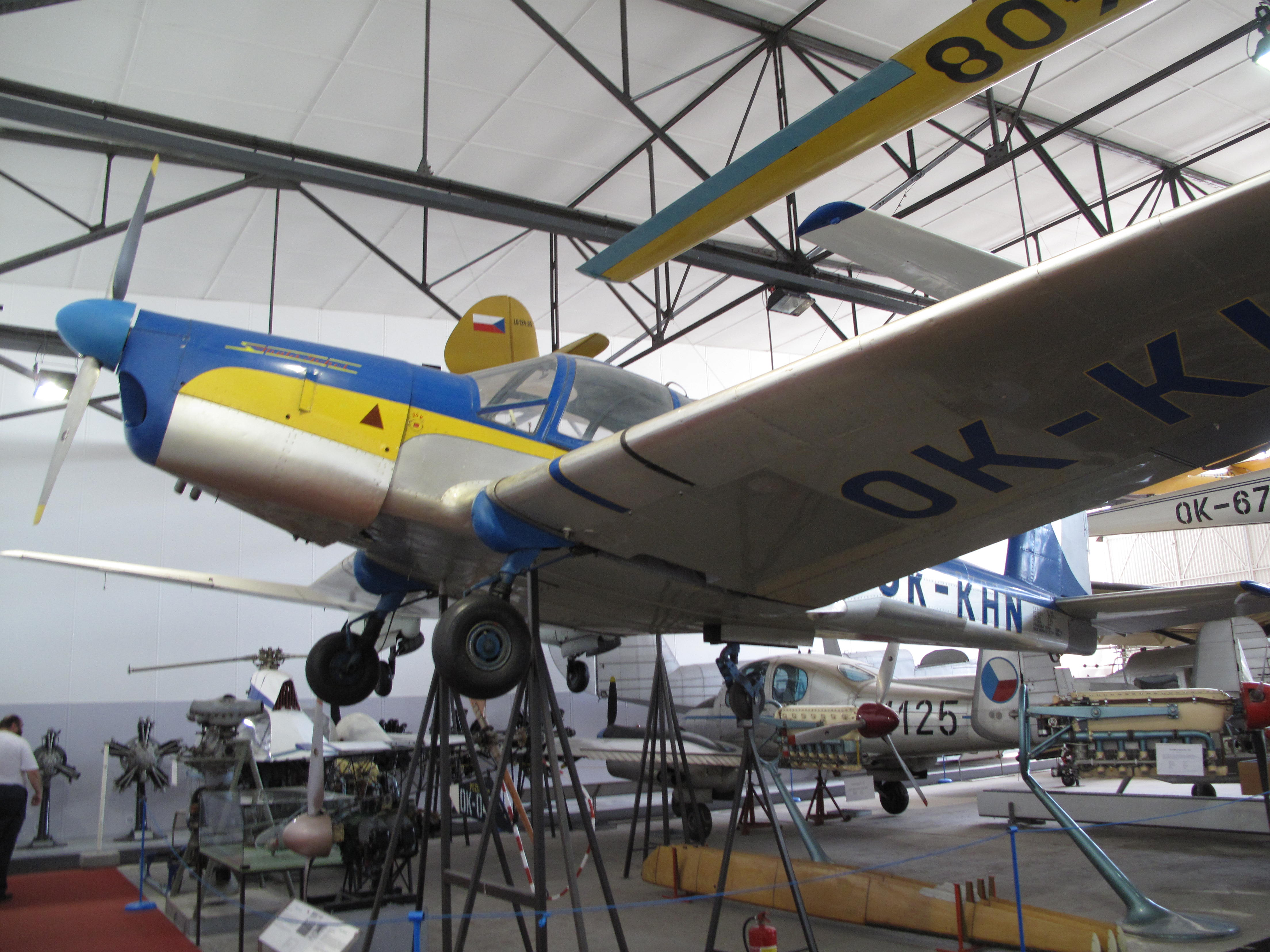 Orlican L-40 Meta Sokol; Letecké muzeum Kbely